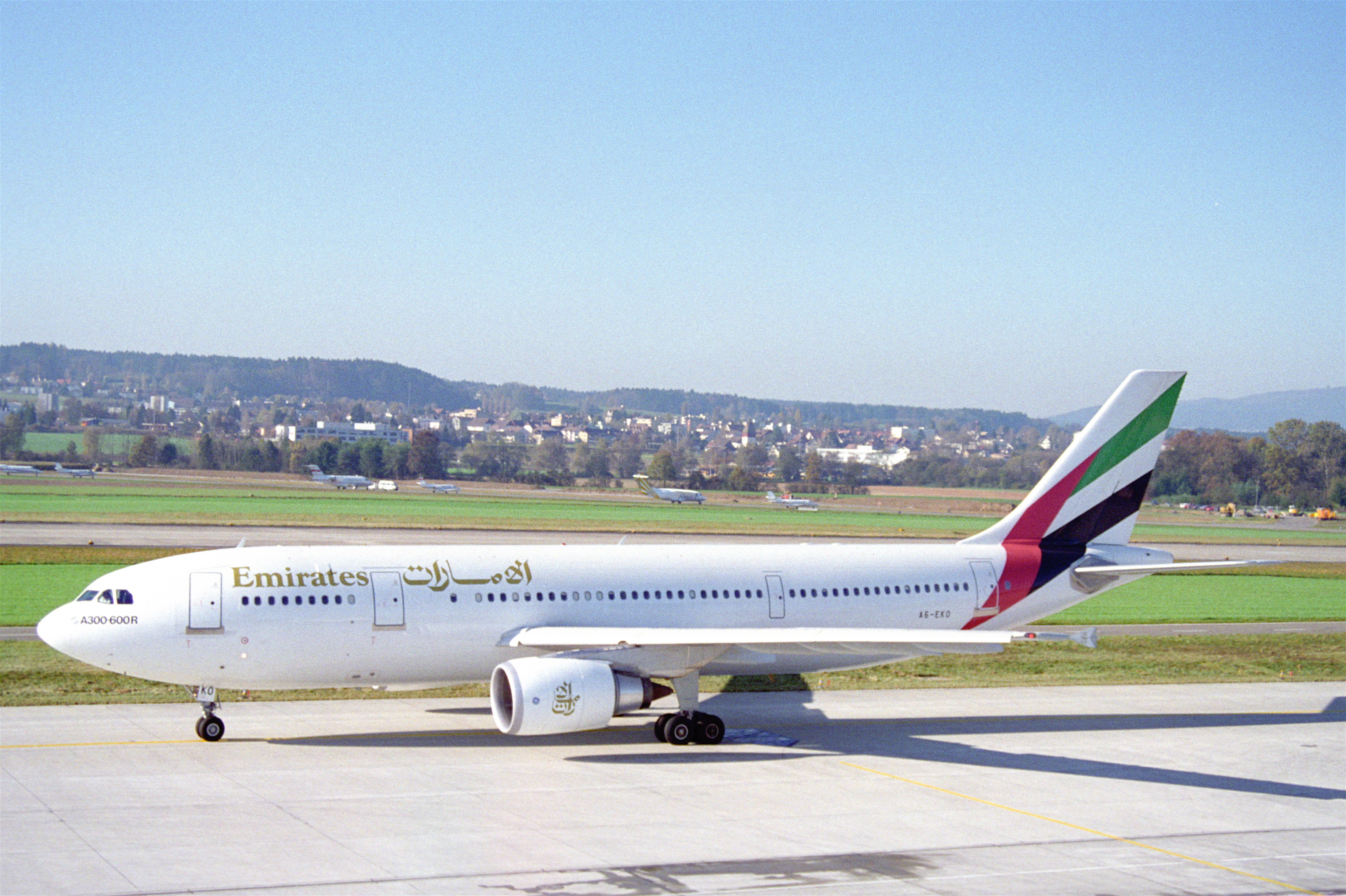 Emirates Airbus A300; A6-EKD@ZRH;12.11.1995